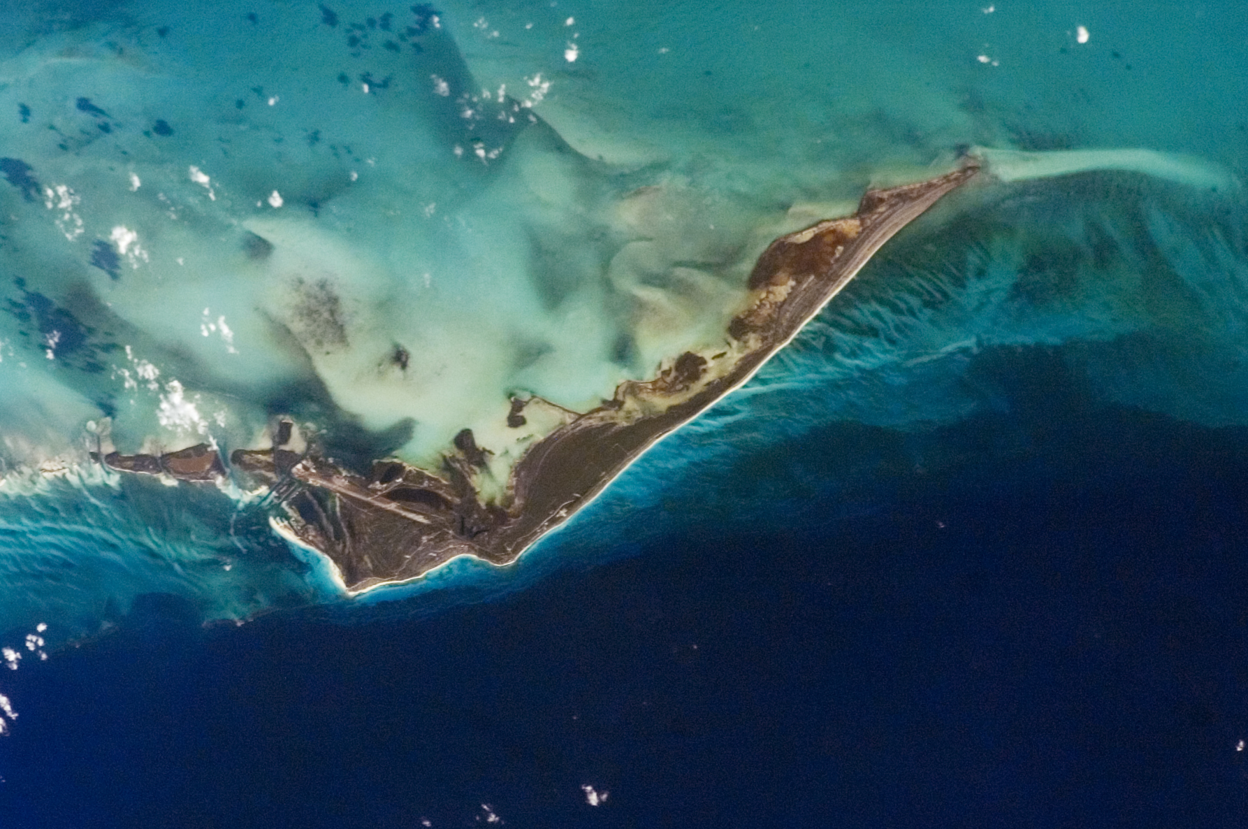 Astronaut photo of Cayo Largo del Sur, Cuba.